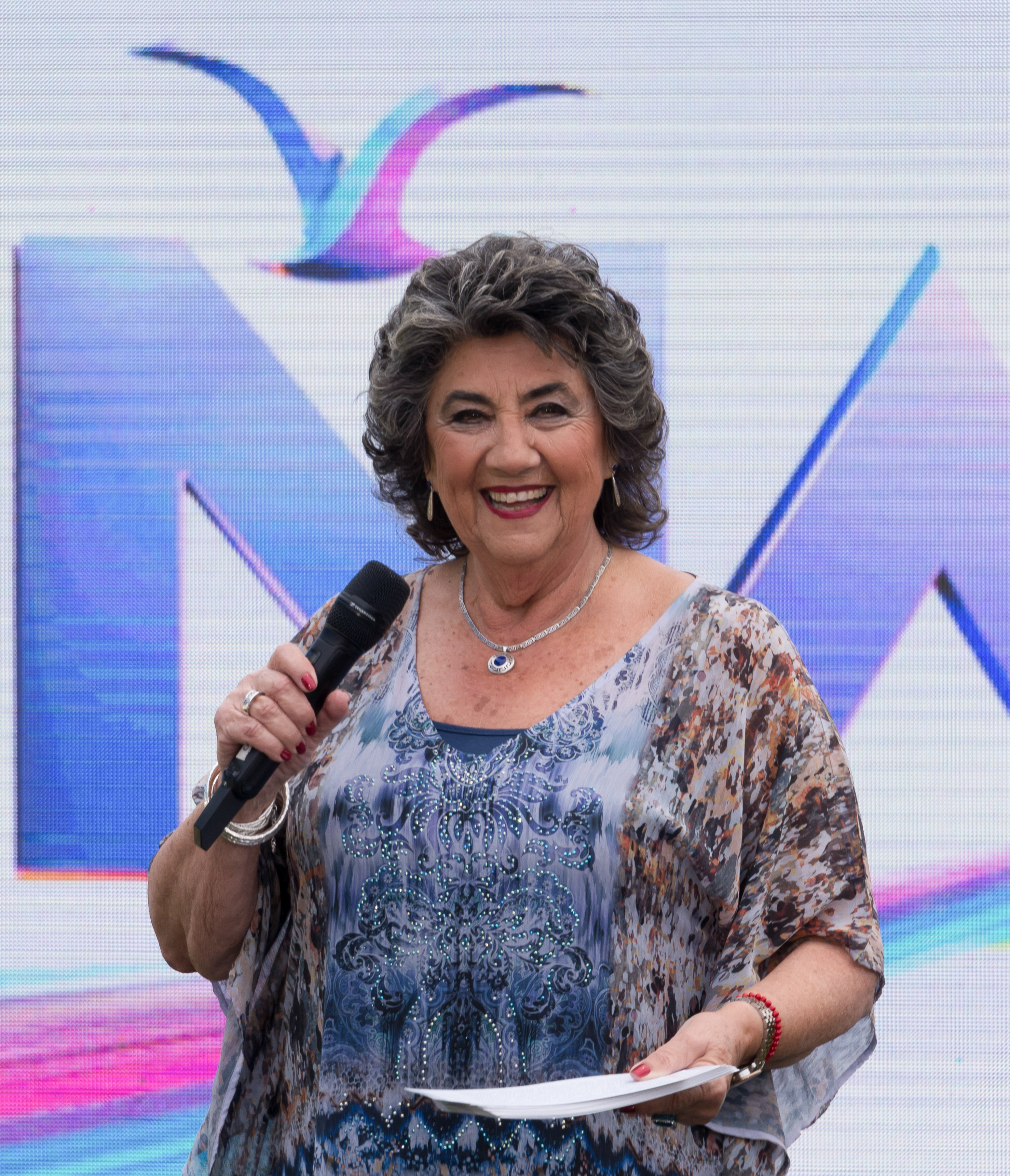 Virginia Reginato, Lanzamiento del Festival de Viña del Mar 2019, Enjoy Viña del Mar, Viña del Mar, Región de Valparaíso, Chile.